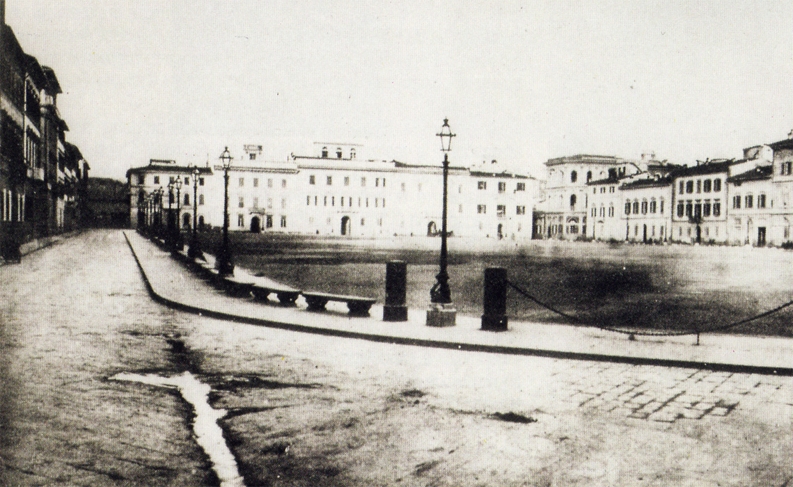 Piazza Maria Antonia a Firenze nel 1860; oggi Piazza dell'Indipendenza.